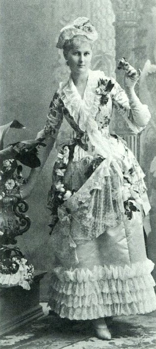 Графиня Варвара Николаевна Бобринская, урожденная княжна Львова (1864–1940), с 1889 года жена графа Алексея Алексеевича Бобринского (1864–1909).